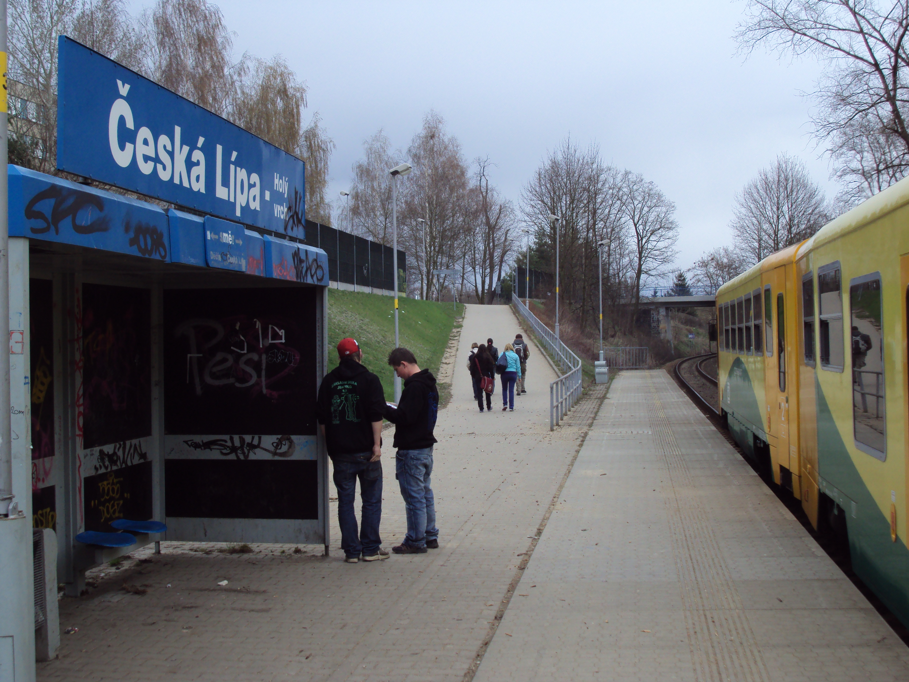 Vlaková zastávka Holý vrch na okraji České Lípy